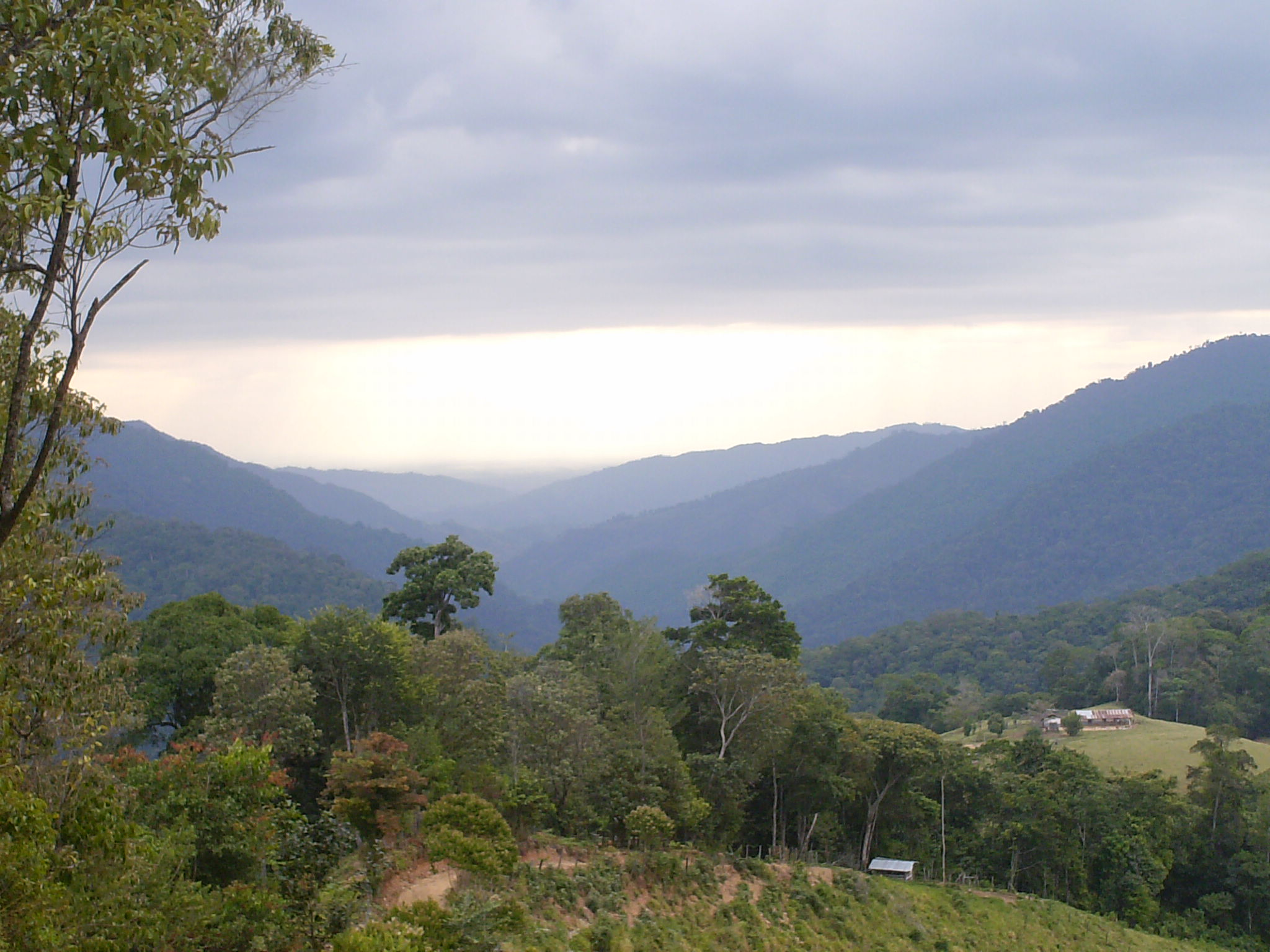 Paisaje de montaña en Barinas